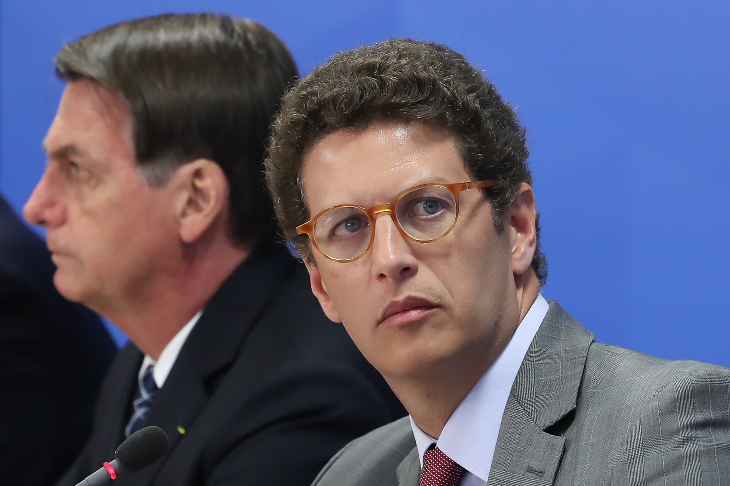 (Brasília - DF, 01/08/2019) Presidente da República, Jair Bolsonaro durante coletiva com a imprensa com o Ministro de Estado do Meio Ambiente, Ricardo Salles, Ministro de Estado das Relações Exteriores, Ernesto Araújo e Ministro de Estado do Gabinete de Segurança Institucional, General Augusto Heleno. Foto: Marcos Corrêa/PR